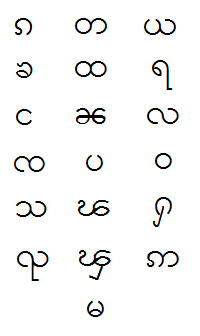 шанский алфавит